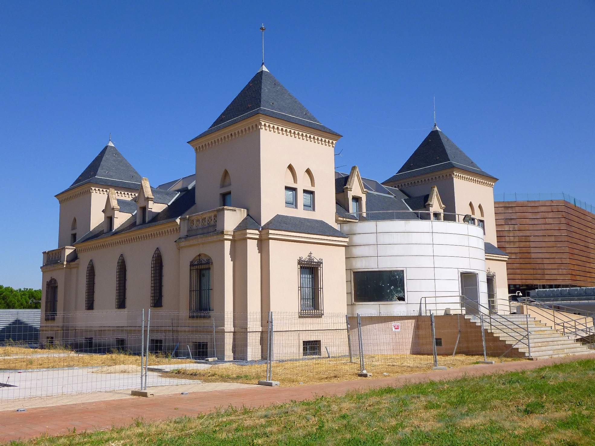 Castillos de los Marqueses de Valderas y Museo de Arte de Vidrio de Alcorcón (MAVA). En Alcorcón, Madrid